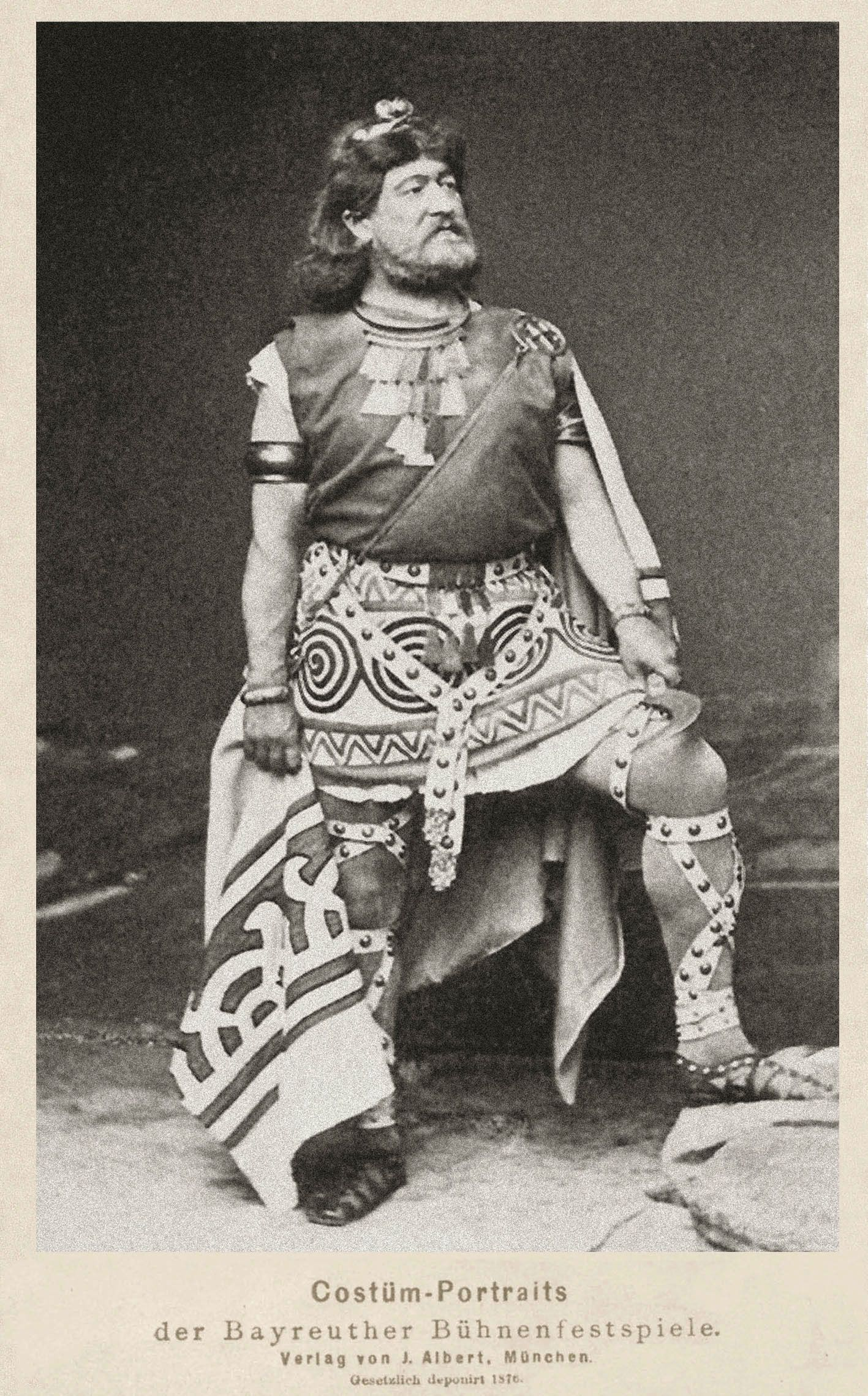 Rudolph Engelhardt 1876 in Bayreuth